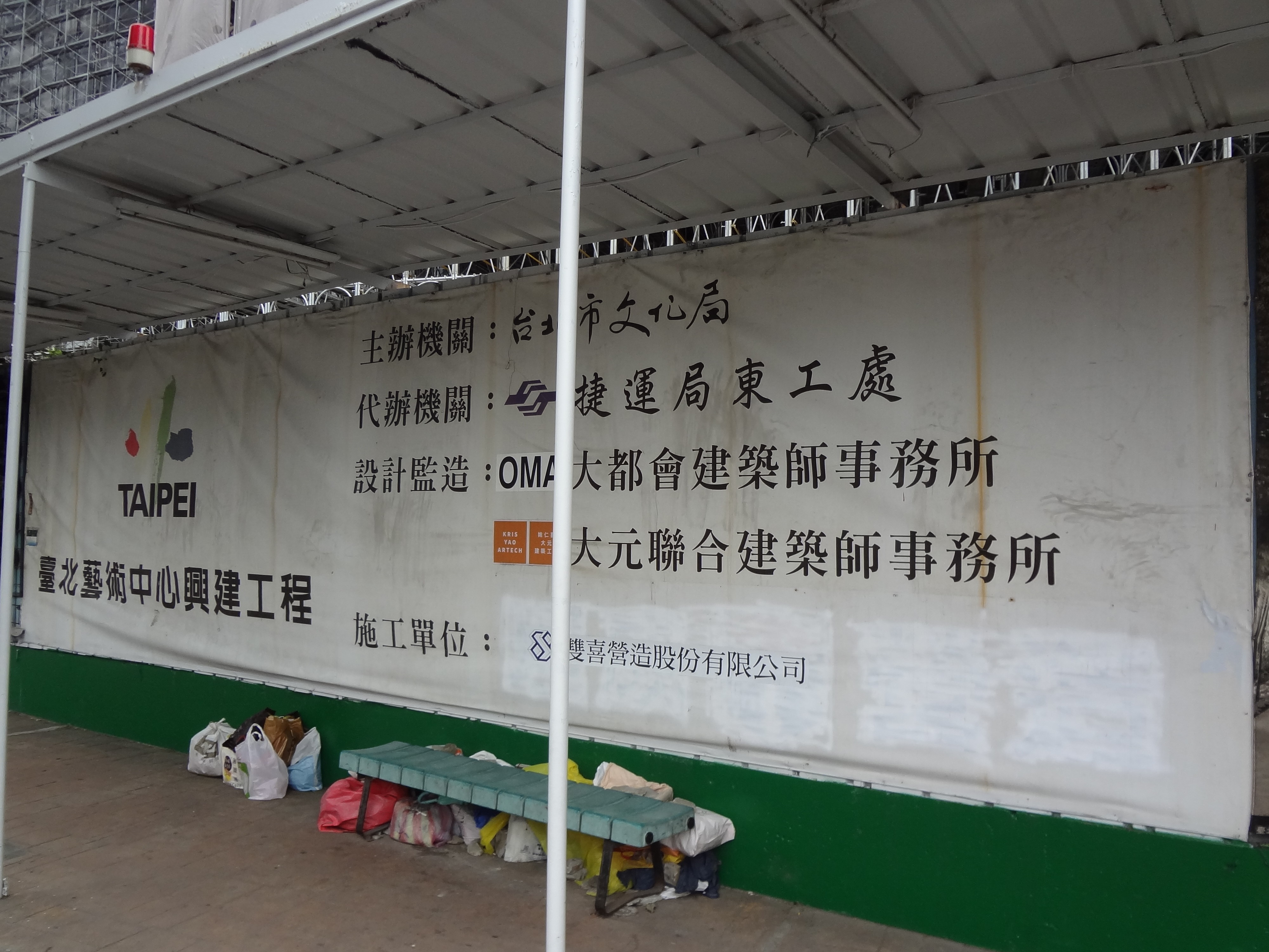 臺北表演藝術中心興建工程參加單位列表帆布，左下角標示「臺北藝術中心興建工程」，右下角理成營造商標被雙喜營造商標取代。